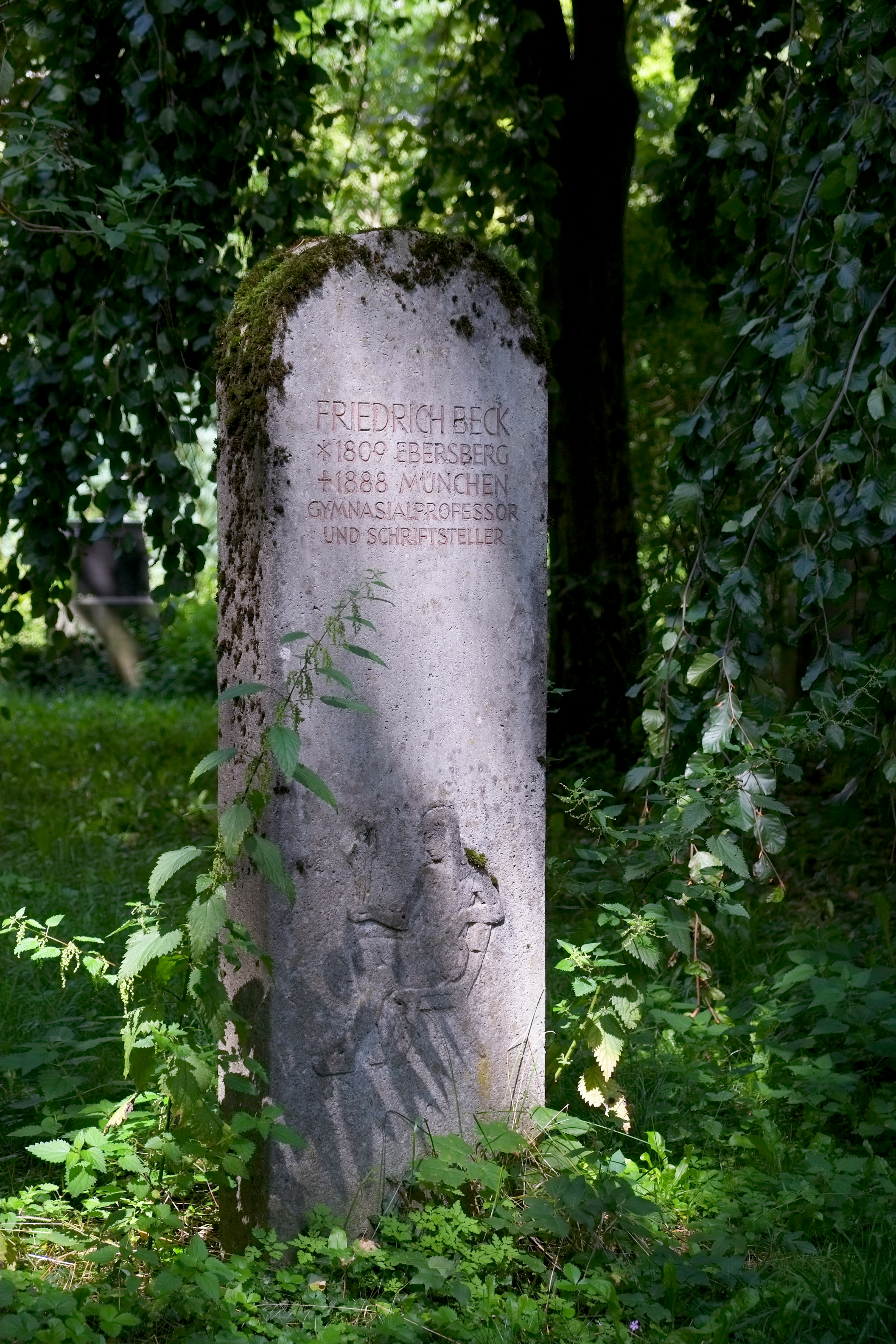 Grabstein für Friedrich Beck auf dem Alten Südfriedhof in München (Bayern, Deutschland)